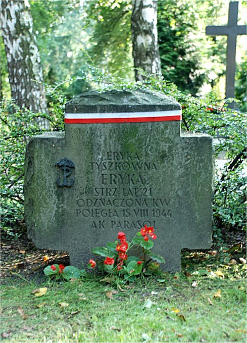 Eryka Tyszkówna, grób na Powązkach wojskowych, Warszawa